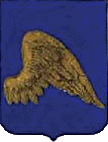 Escut del llinatge Albalat al Principat de Catalunya i al Regne de València (antiga Corona d'Aragó).